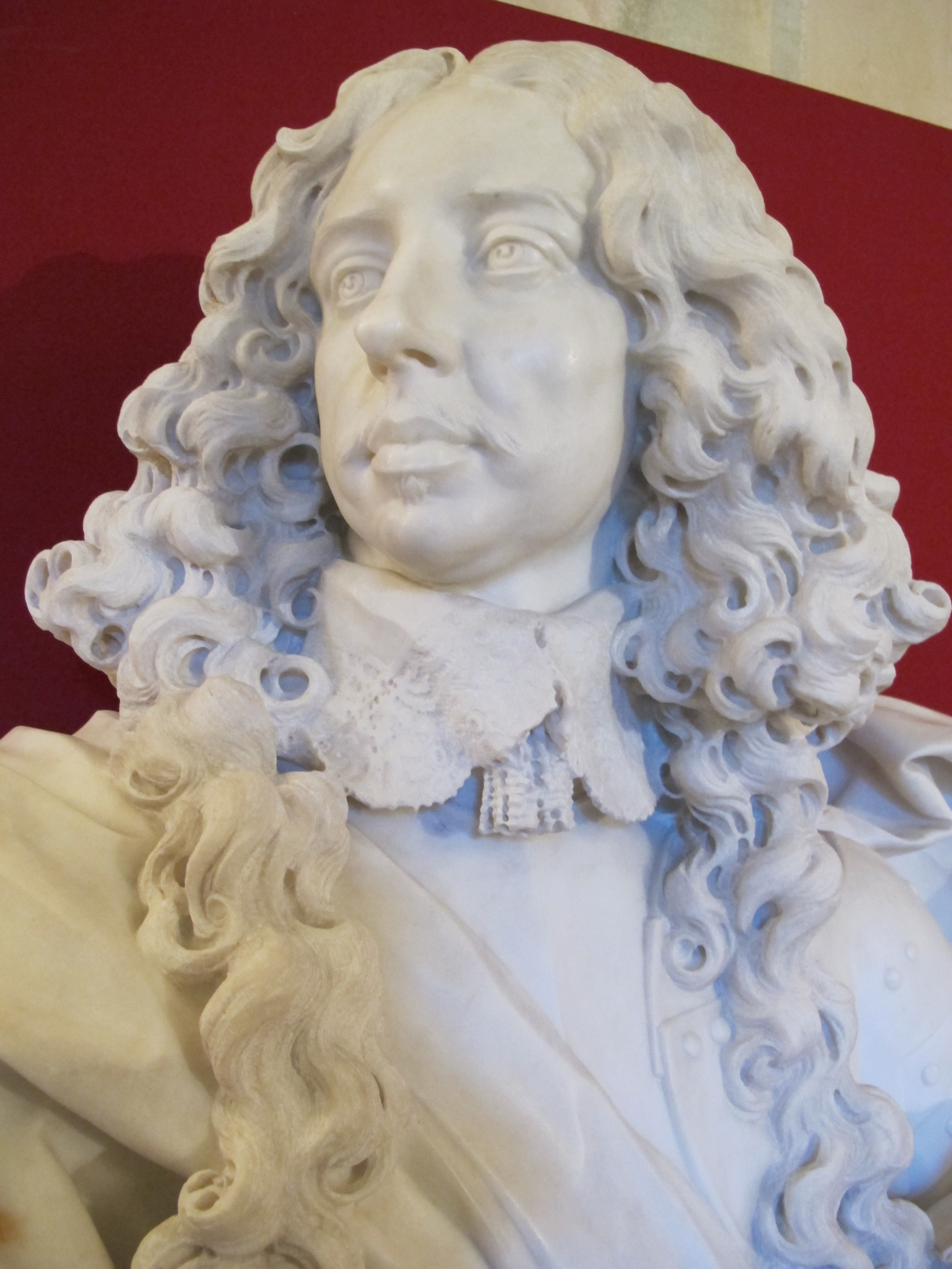 Gianlorenzo bernini, busto di francesco I d'este, 1650-51